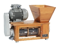 Erste Wirbelstrom-Siebmaschine aus Holz